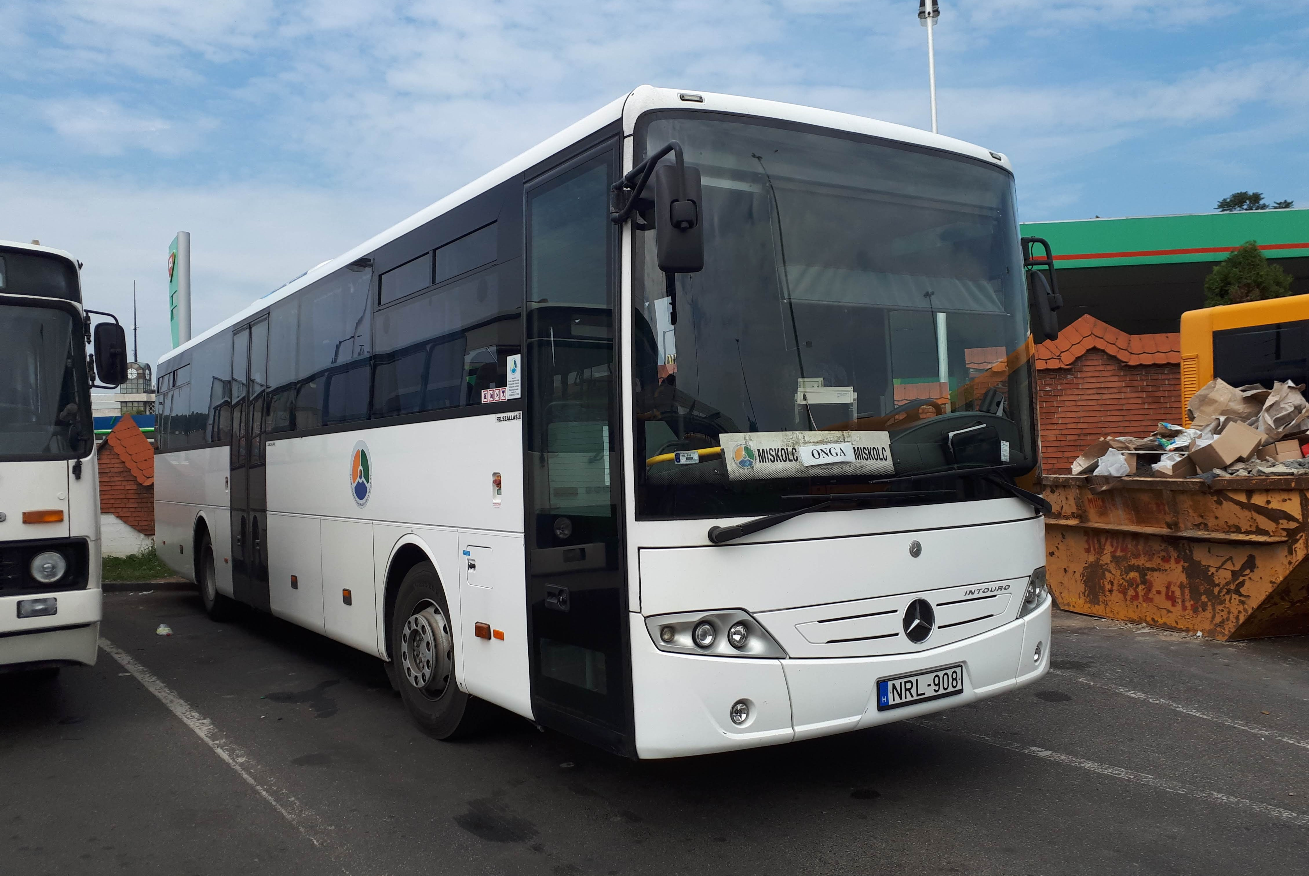 Az ÉMKK NRL-908 rendszámú Mercedes Intouro busza Miskolcon, a 3724-es helyközi járaton.